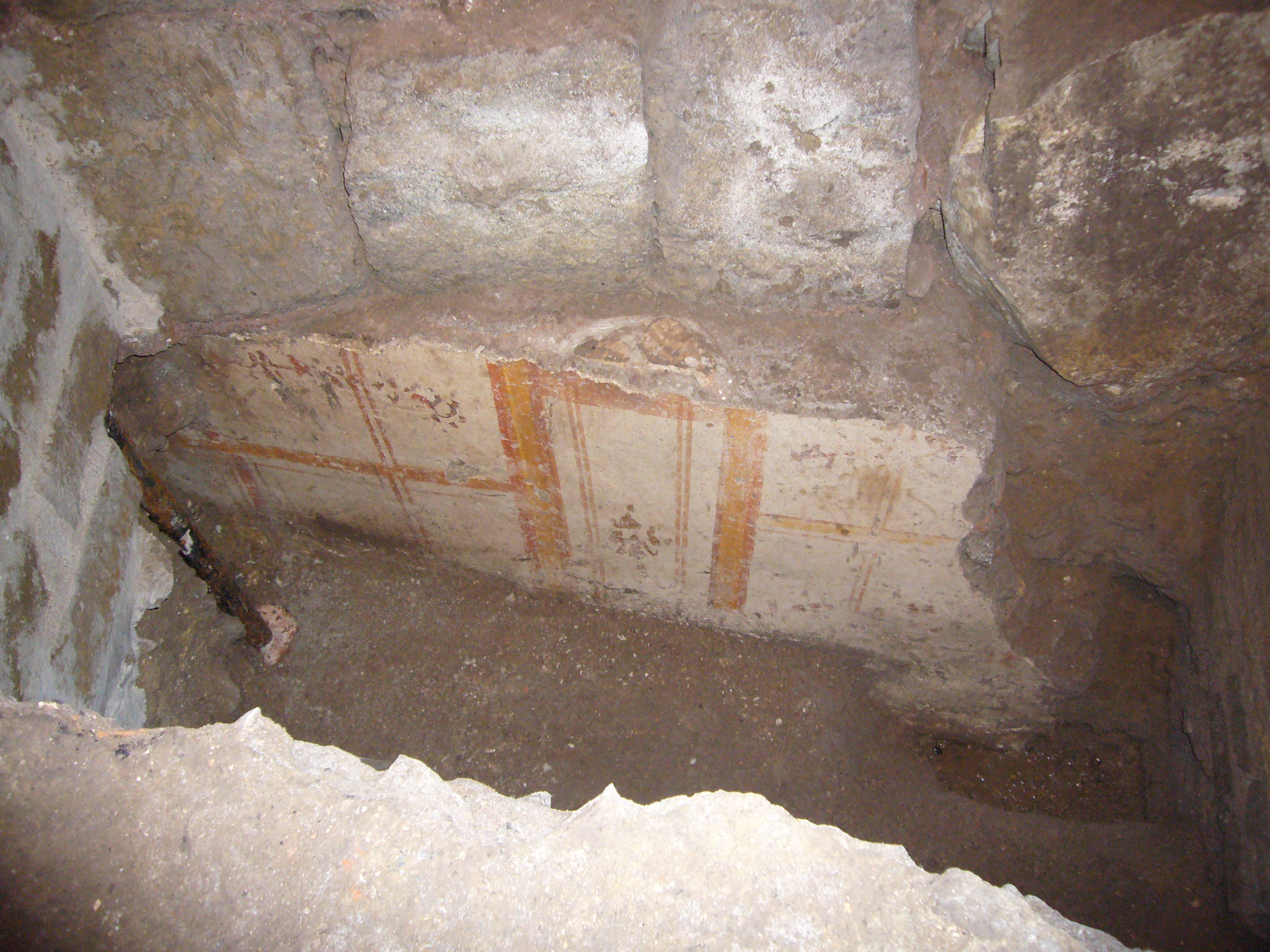 Roma, san Lorenzo in Lucina, scavi sotto la navata: decorazioni parietali